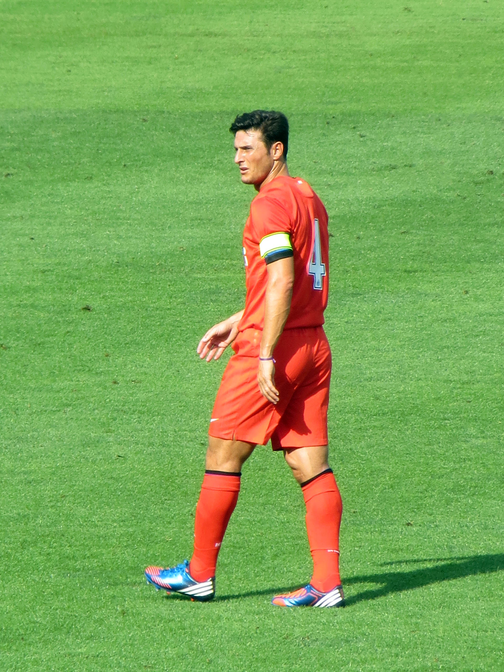 Javier Zanetti durante Inter-Koper 2-0. Foto scattata da Roberta Accettulli